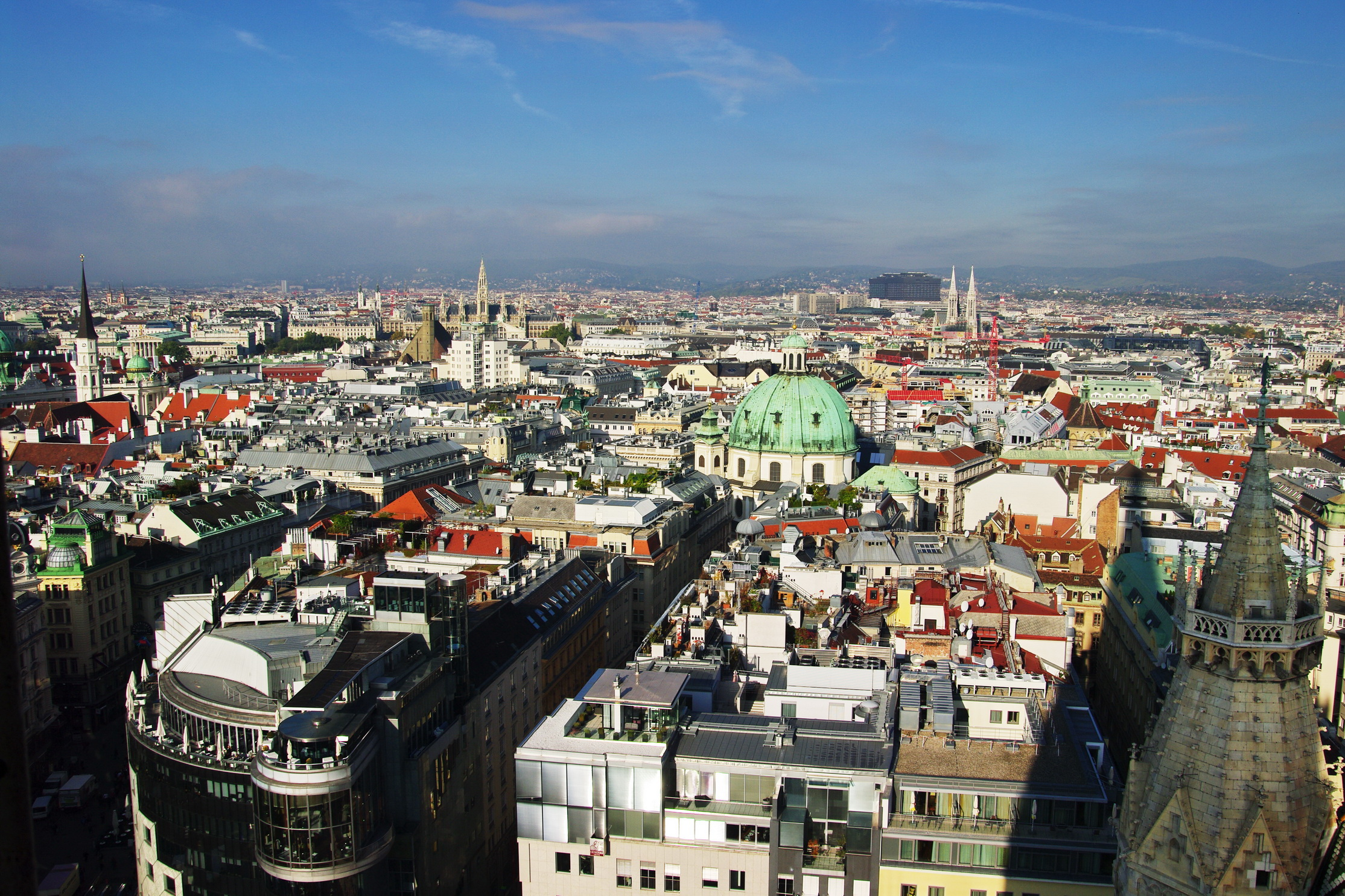 Blick vom Südturm des Stephansdoms nach Westen